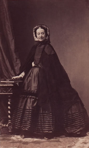 Foto de María Francisca Palafox Portocarrero y KirkPatrick, 12ª duquesa de Peñaranda (1825-1860)